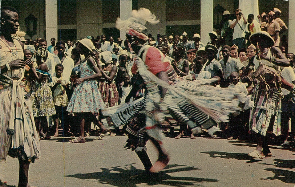 Postcard: Foto Serra No 100 - Dançarino mandinga (Farim)